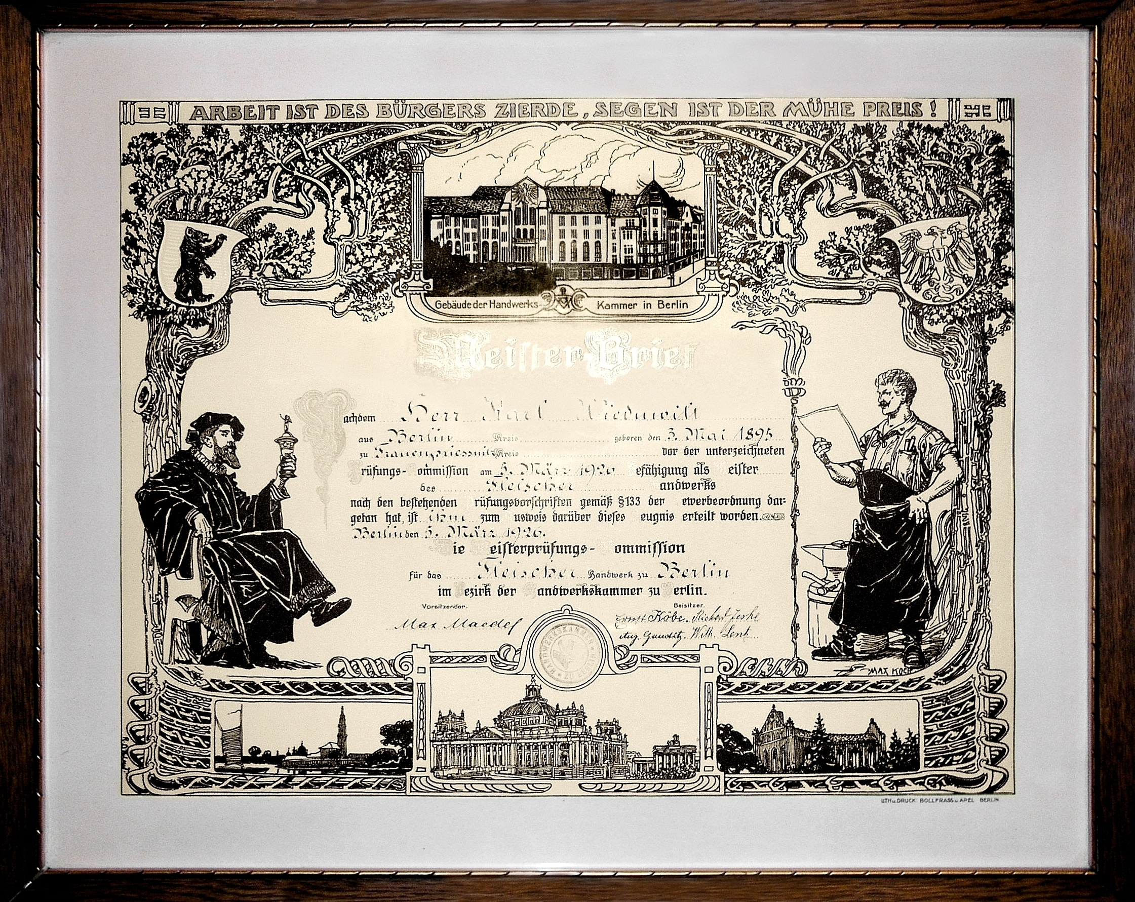 als Geschenk von der Tochter des Fleischers zur eigenen Verwendung erhalten: 44penguins